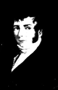 Antoine Coppieters de Tergonde (1757-1831), burgmeester van Kortrijk